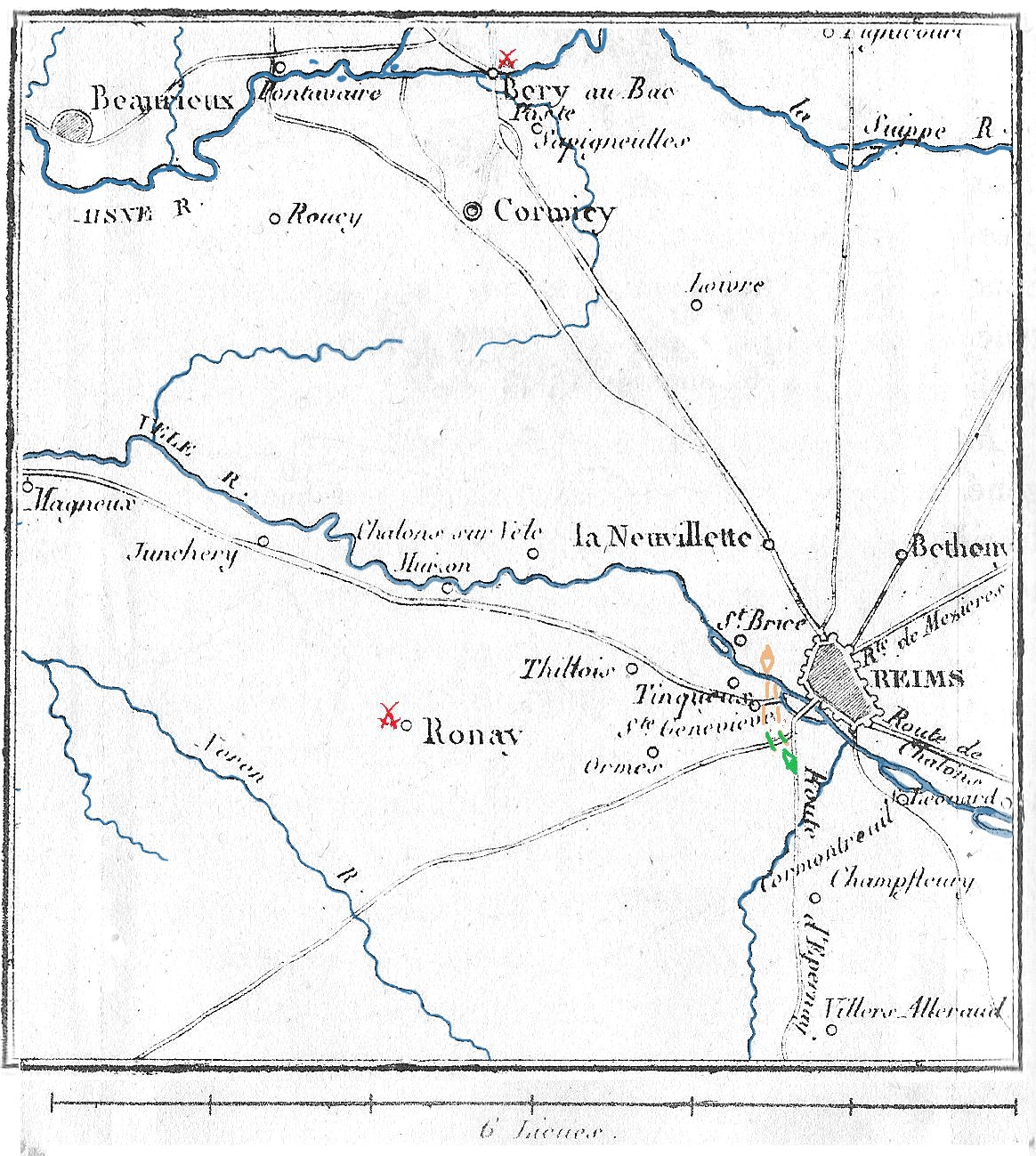 Tome 13_carte n°101_la_bataille_de_Reims .